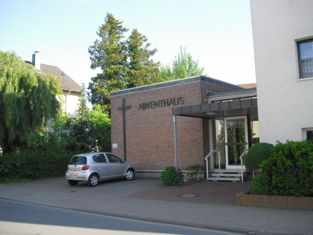 Kirche der Adventisten in Oldenburg i. Oldbg.